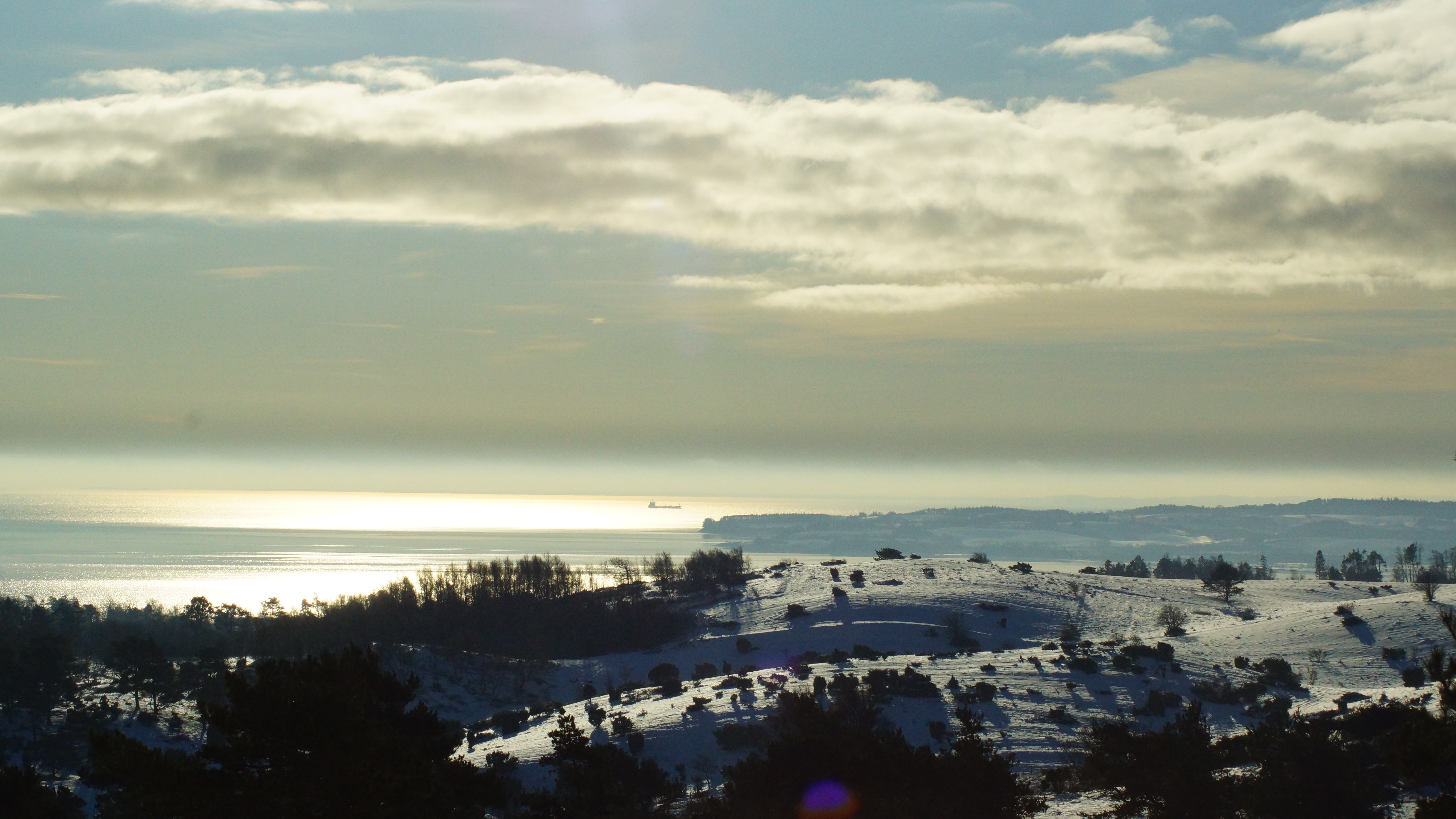 Østhelgenæs og Ebelt Vig, Nat Park Mols Bj., fra vej øst f. Trehøje (2)